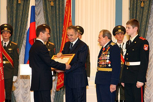 Грамота о присвоении городу Дмитрову почётного звания «Город воинской славы» передаётся главе муниципального района Валерию Гаврилову. Справа – участник Великой Отечественной войны Борис Шугаев и учащийся кадетского класса Деденёвской средней школы Максим Финогенов.